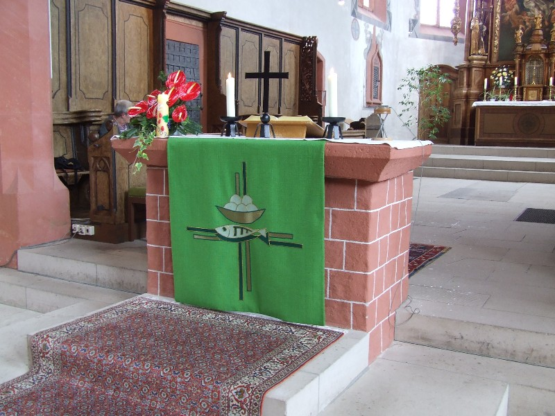 Simultankirche in Bechtolsheim im Hintergrund der Petersberg